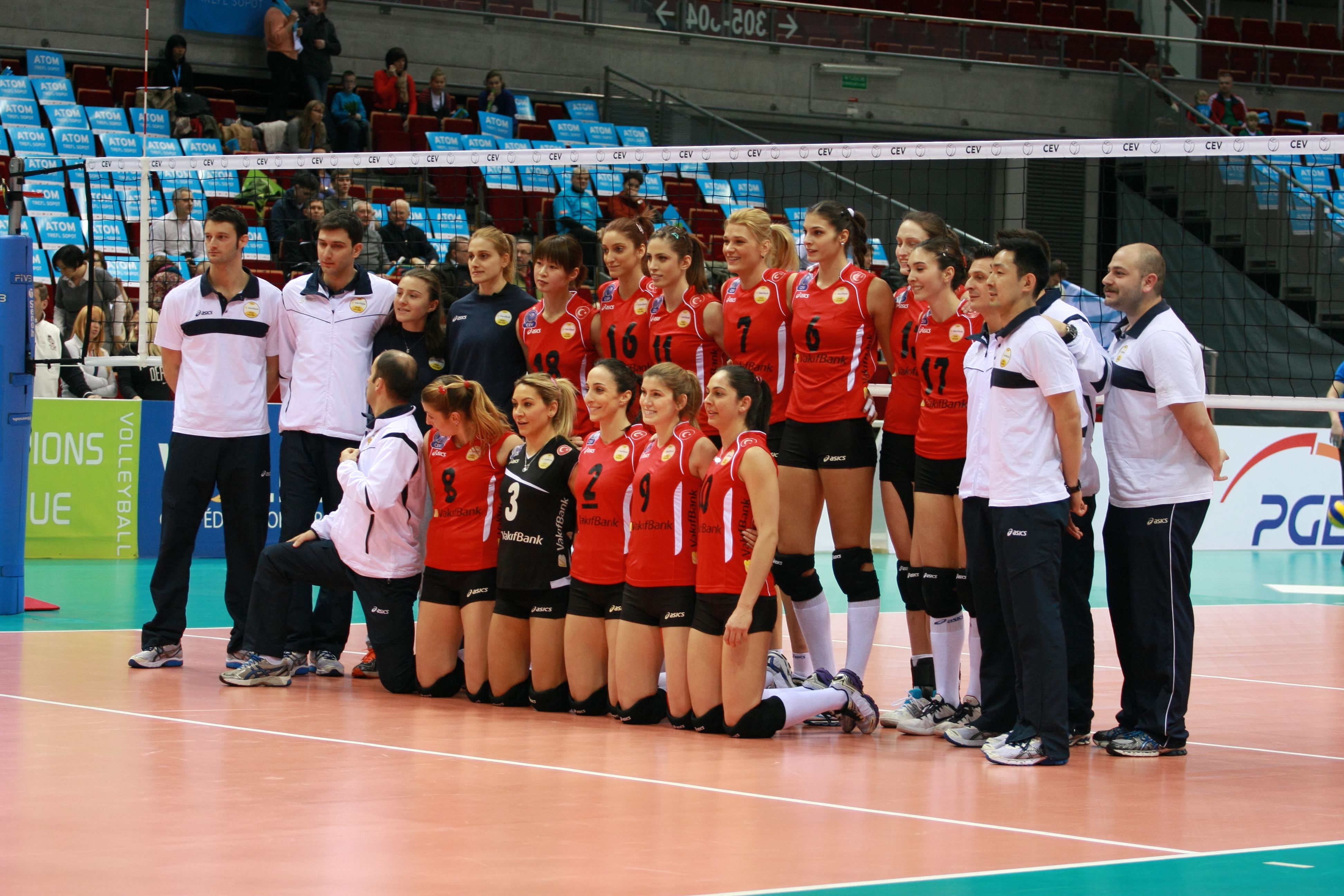 Vakifbank Istanbul